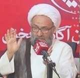 Ayatollah Mohsen Heidari Alekasir